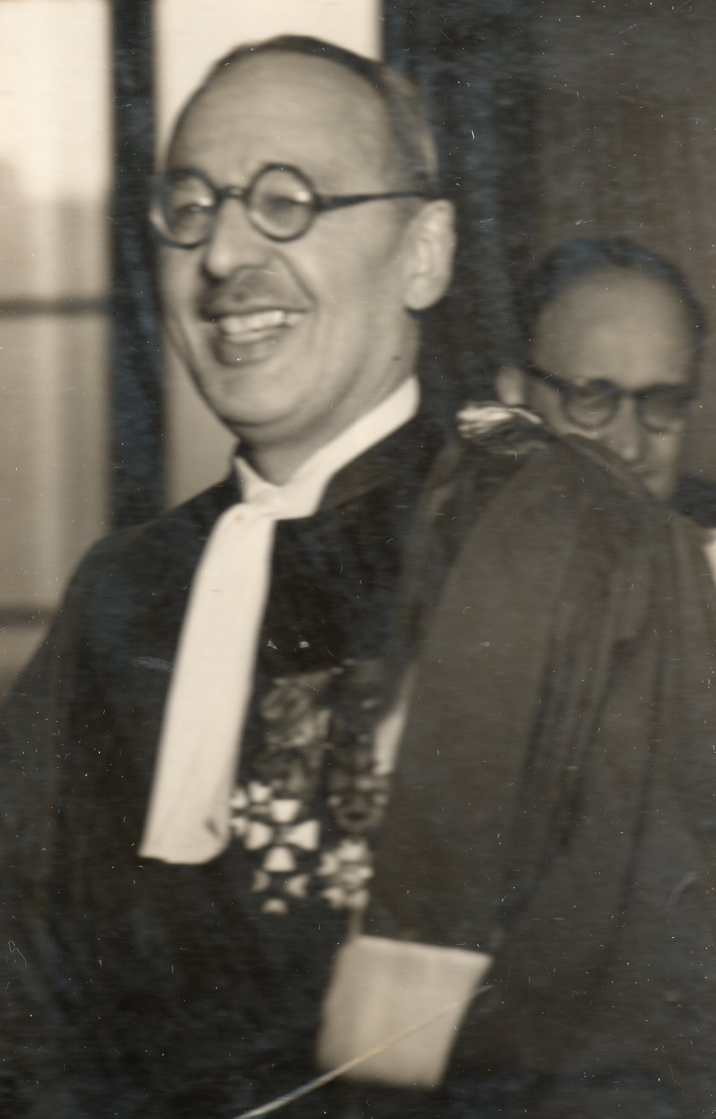 Professeur de droit